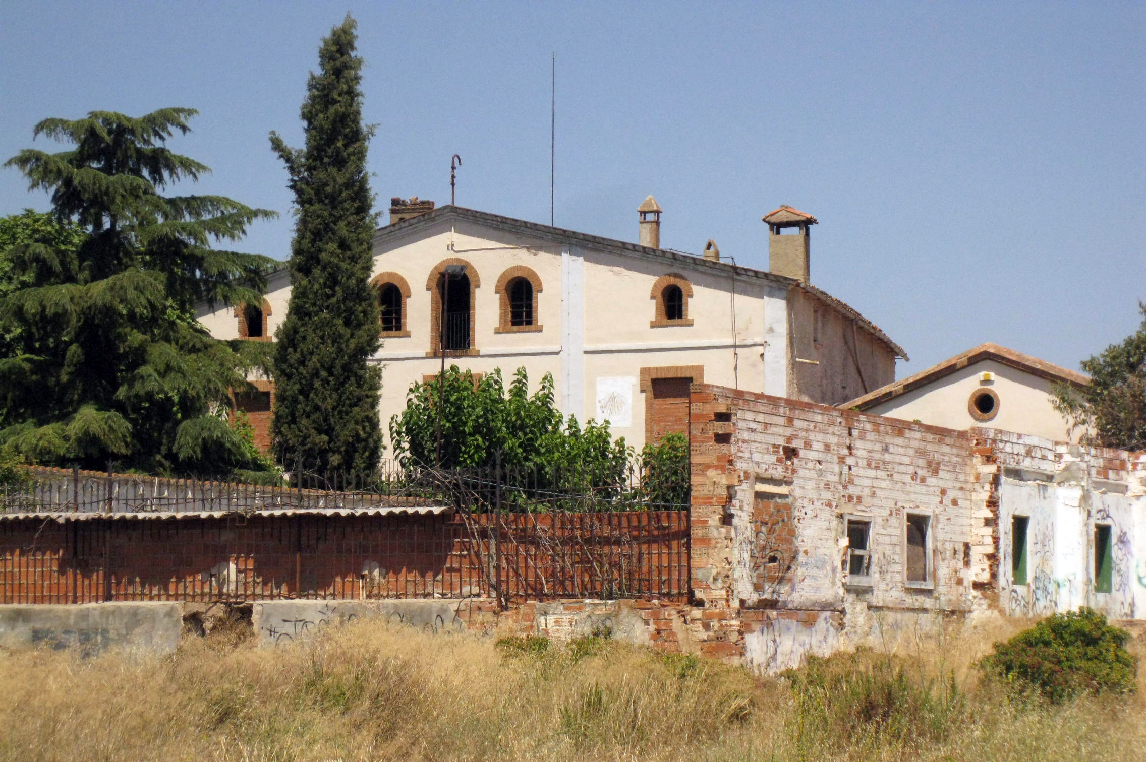 Can Montllor (Terrassa)